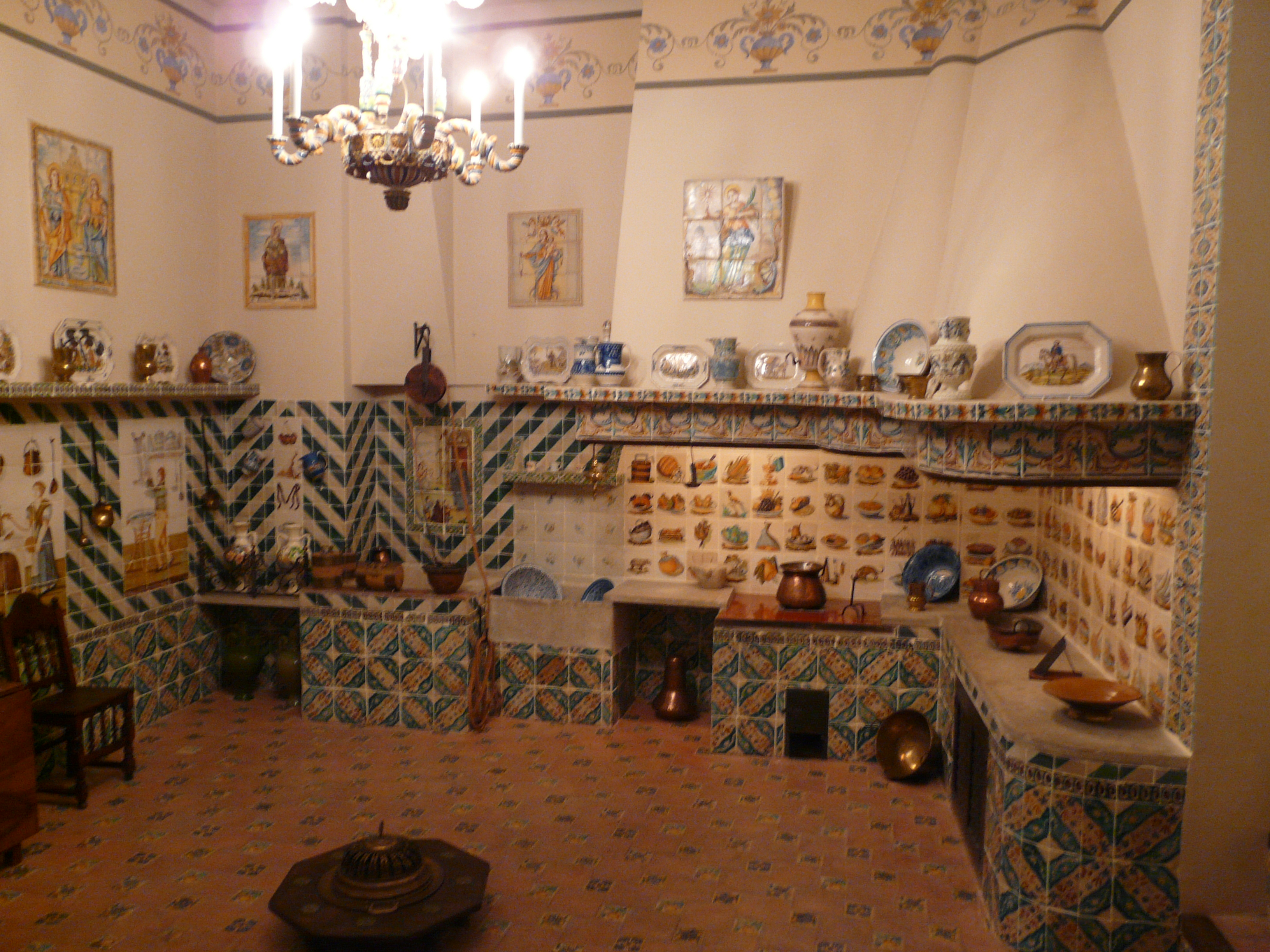 Palau del Marqués de Dosaigües (València) Object location39° 28′ 21.52″ N, 0° 22′ 29.32″ W